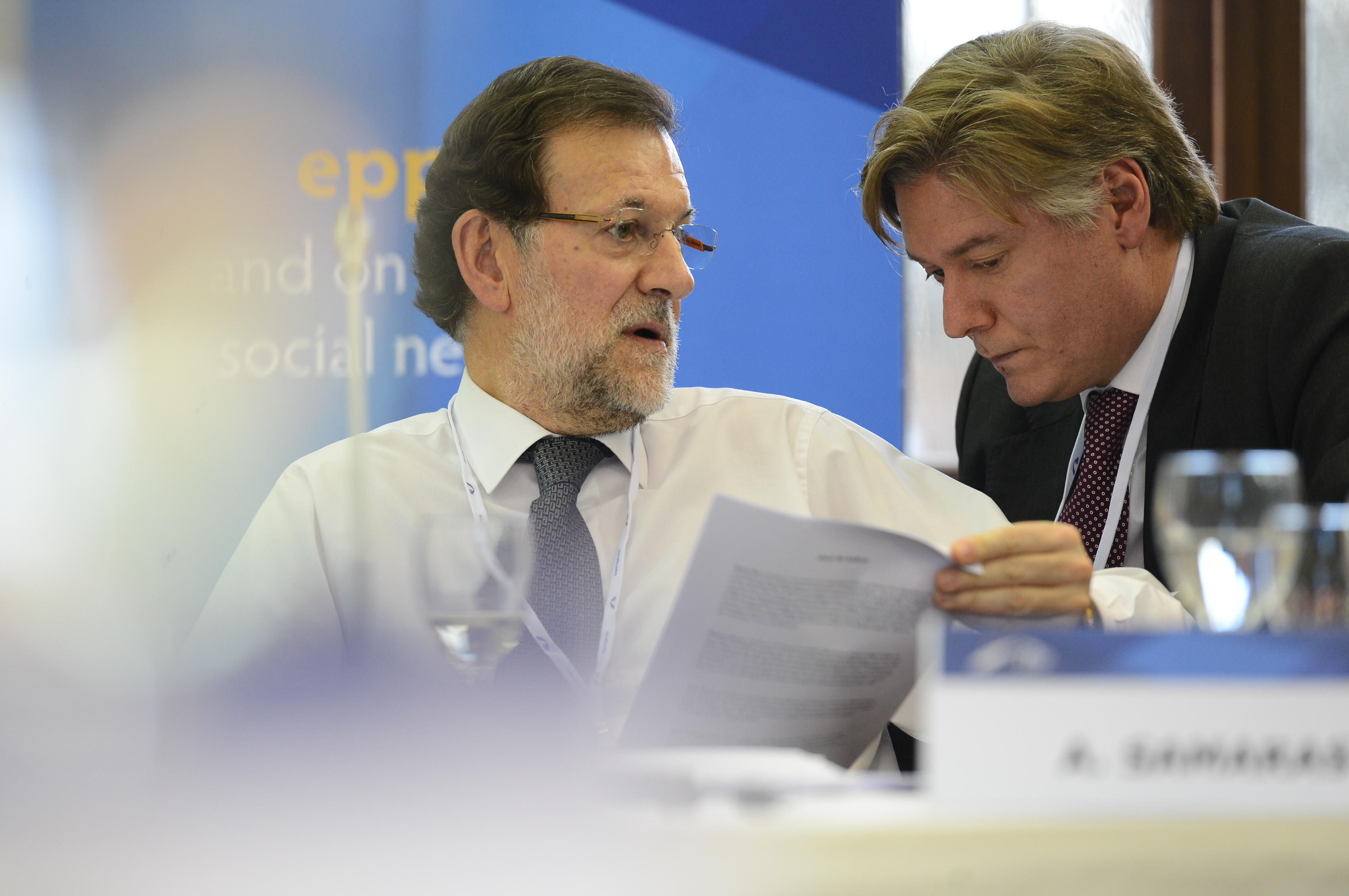 EPP Summit; Meise, Dec. 2013